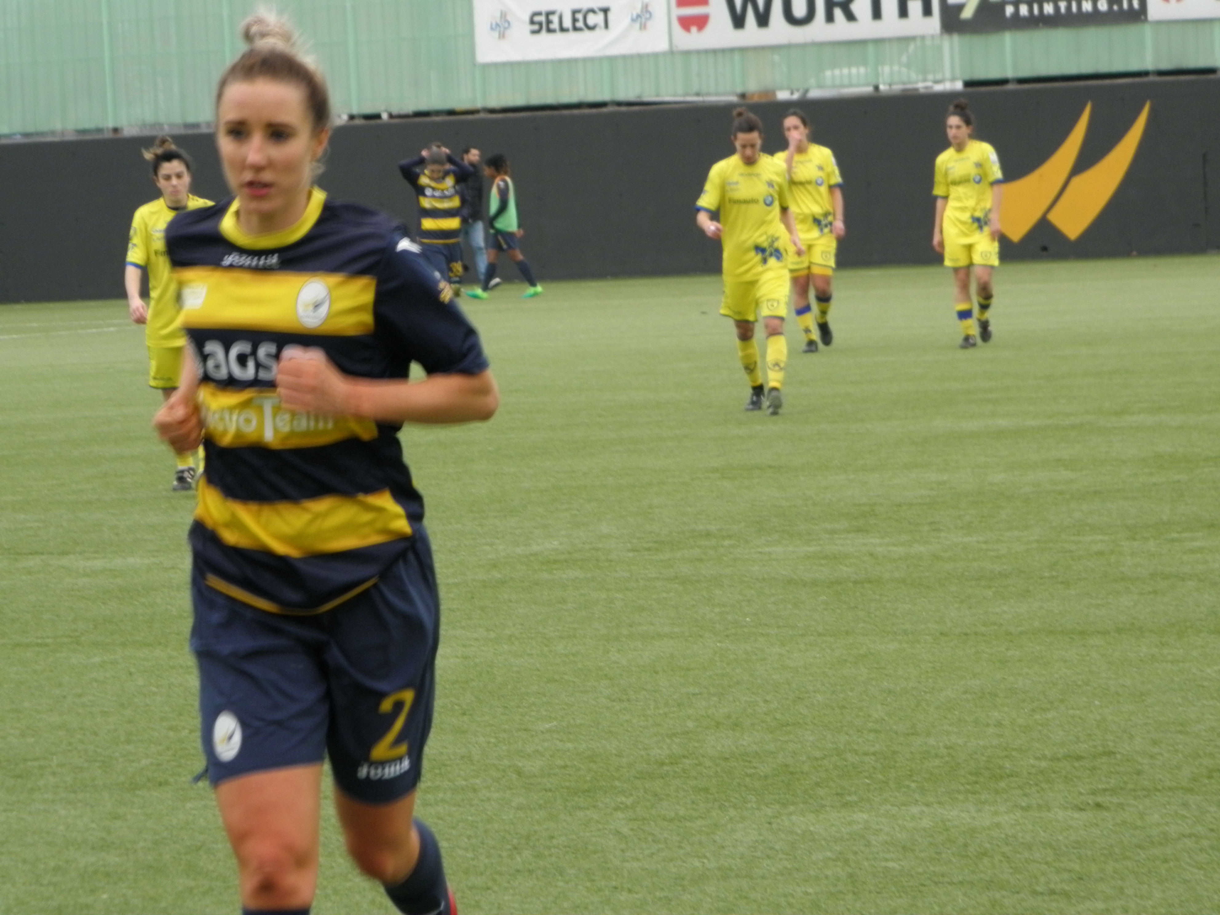 Verona, Stadio Aldo Olivieri: scatti vari primo tempo del derby vinto dal Fimauto Valpolicella sull'AGSM Verona del 17 febbraio 2018.